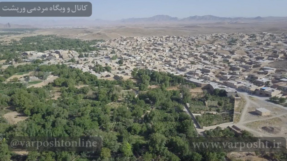 روستای ورپشت، شهرستان تیران و کرون، استان اصفهان